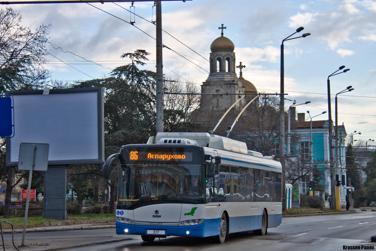 Škoda 26Tr Solaris 2